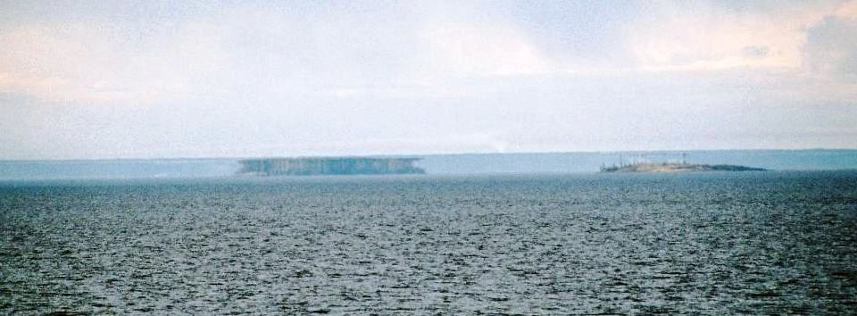 Superior mirage on Lake Ladoga, Russia